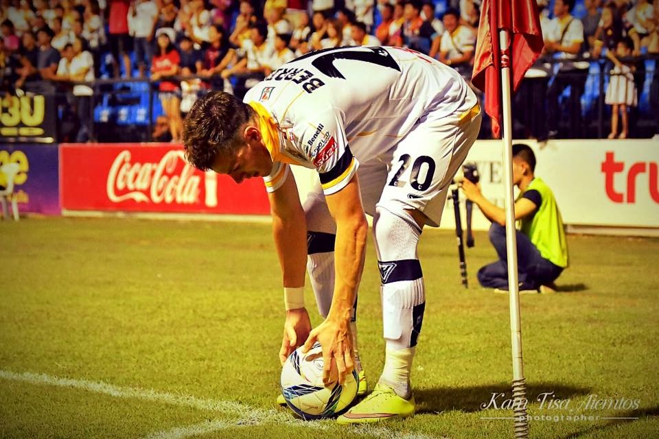 Foto 04